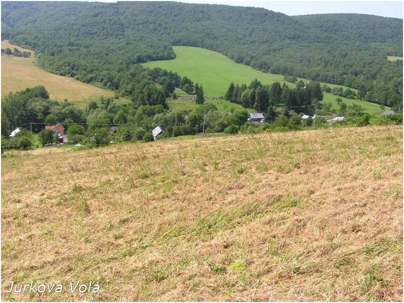 Celkový pohľad